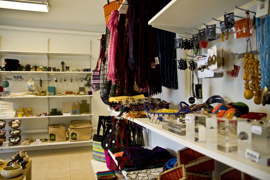 Bilden visar Världsbutiken Klotet i Borås.